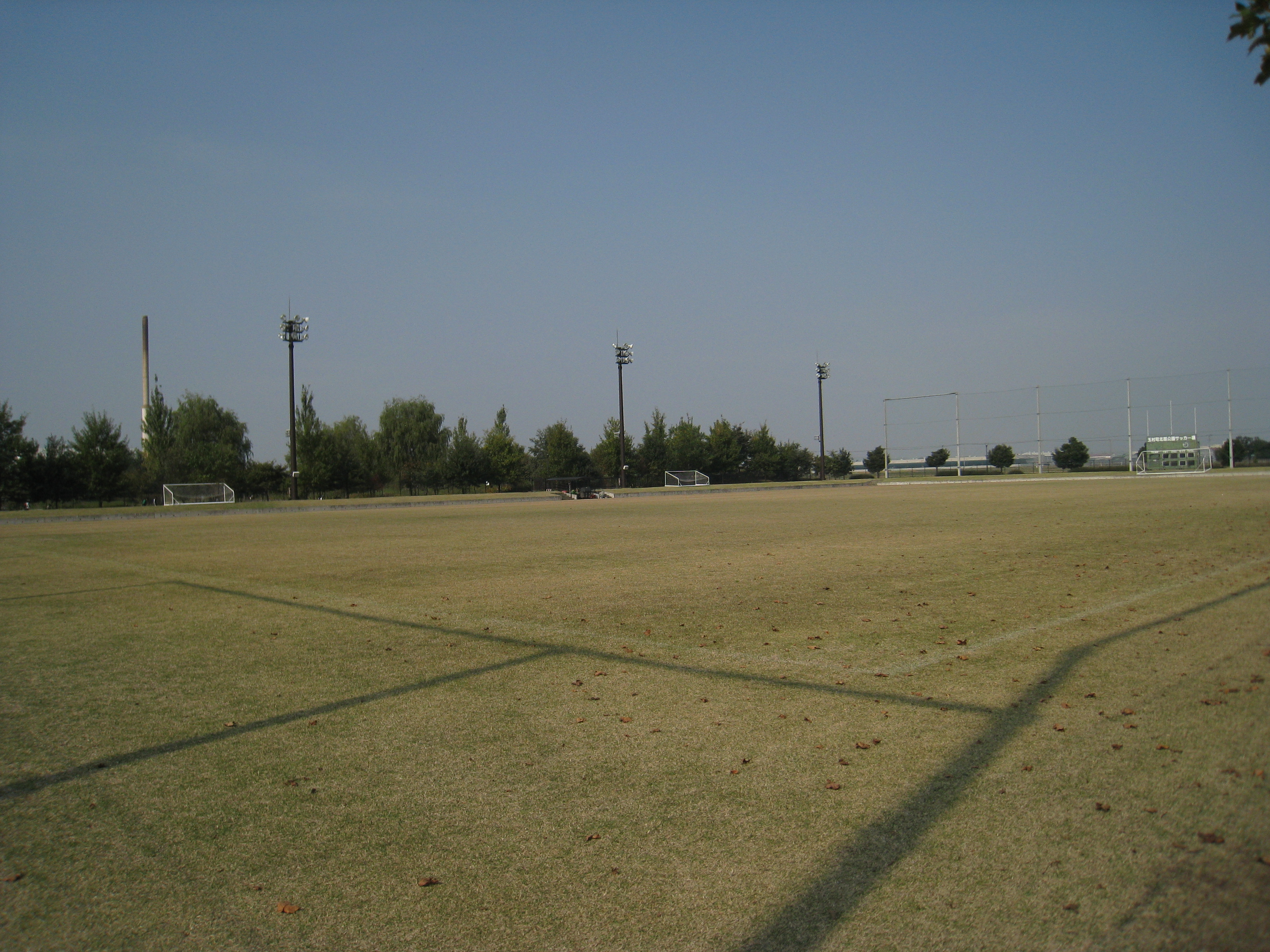 玉村町北部公園サッカー場